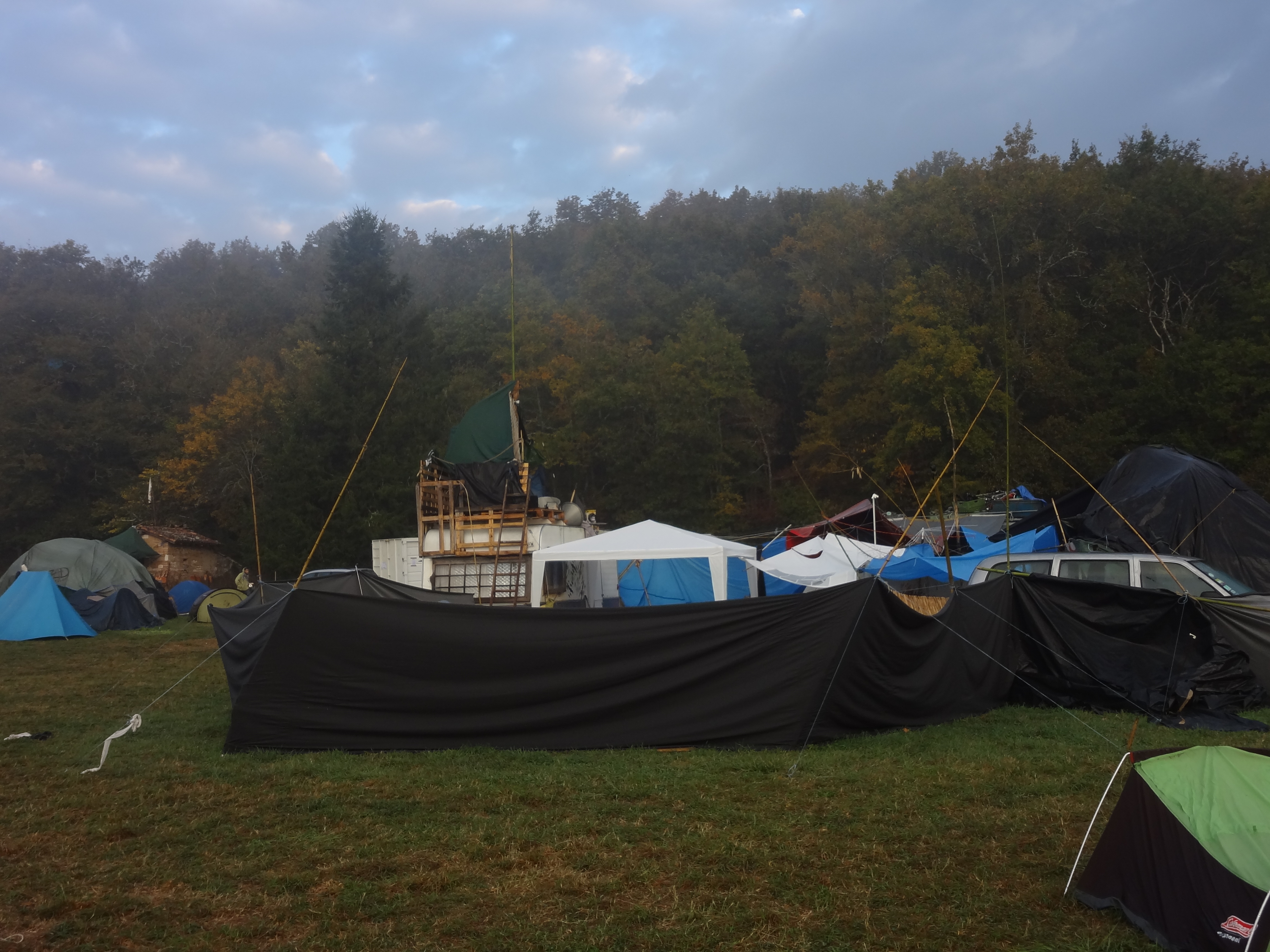 Enceinte du camp prévue pour la radio pirate de la ZAD du Testet